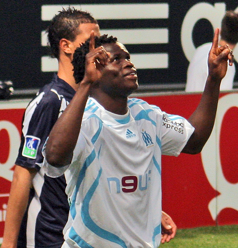 Olympique de Marseille - Girondins de Bordeaux Taye Taiwo 2007-2008